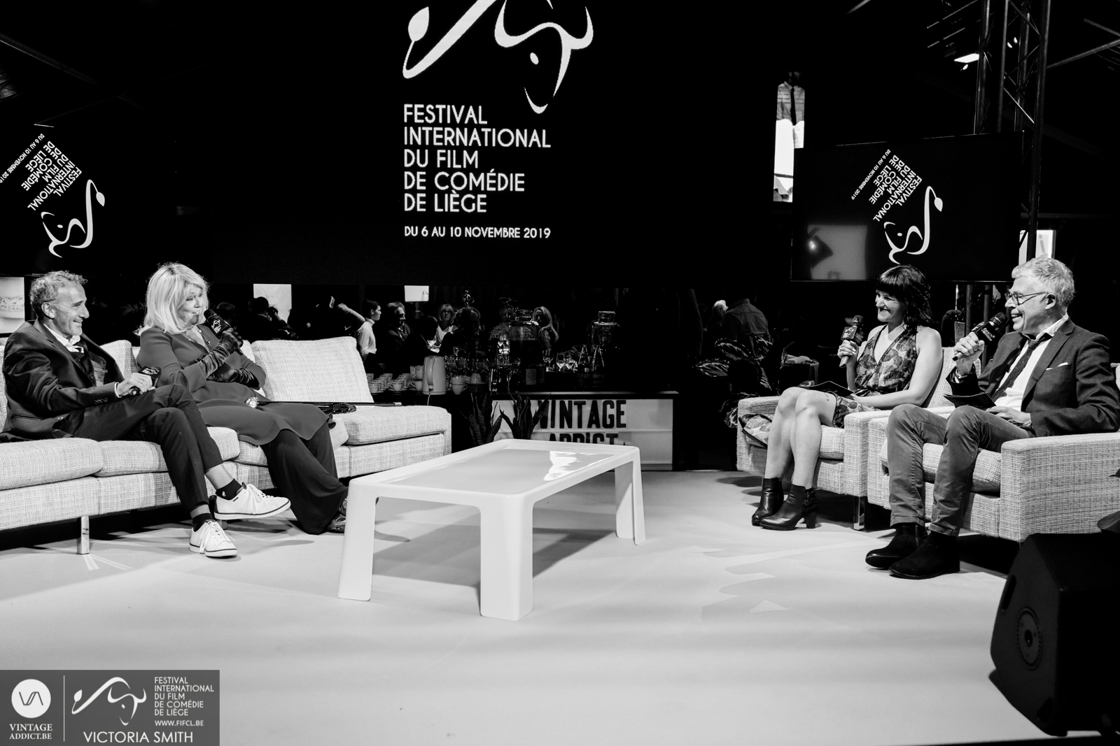 Plateau TV avec Elie Semoun